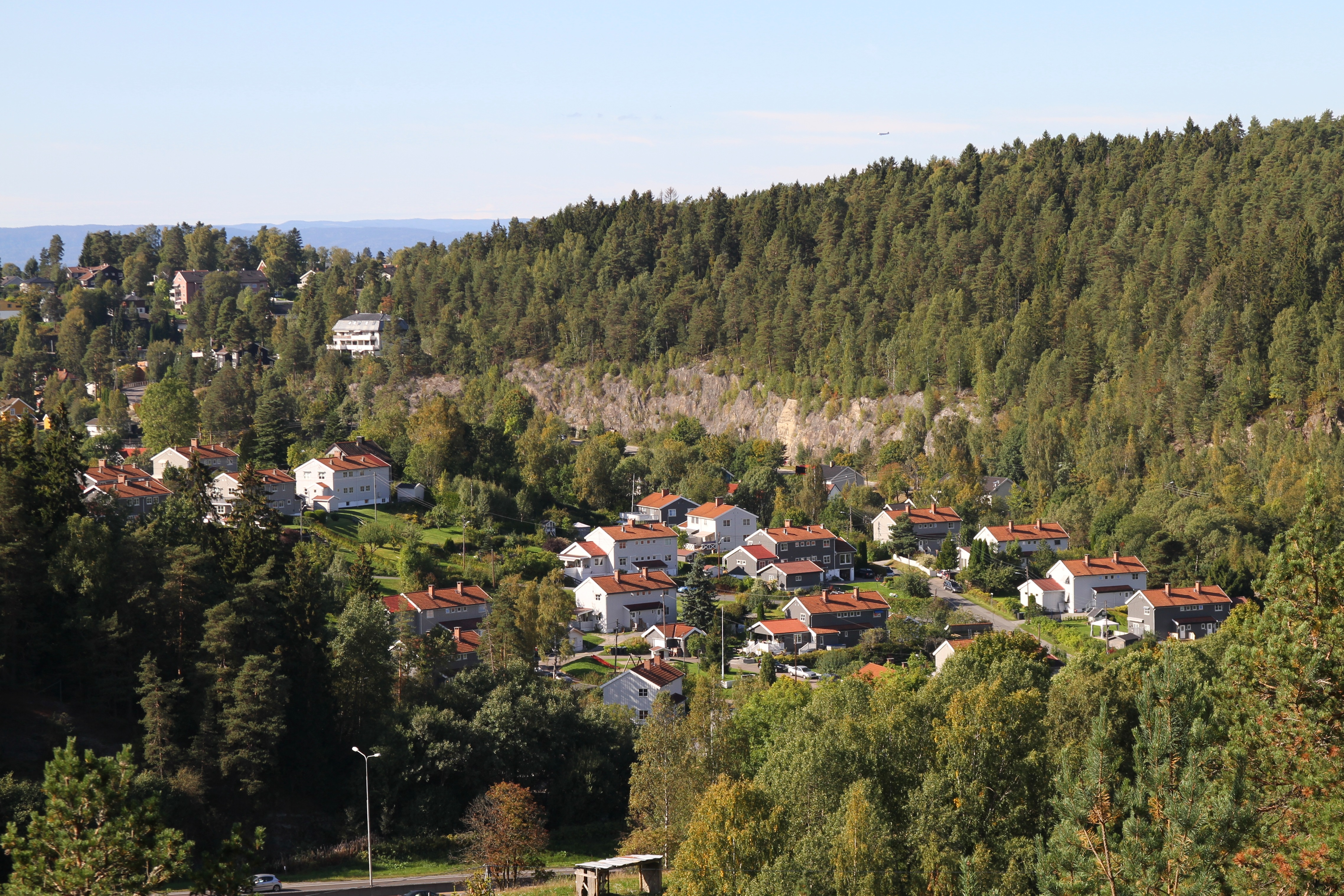 Leirskallen sett fra Midtåsen, et høydedrag på andre siden av E6.